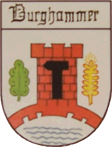 Wappen von Burghammer (Gemeinde Spreetal, Sachsen, Deutschland)